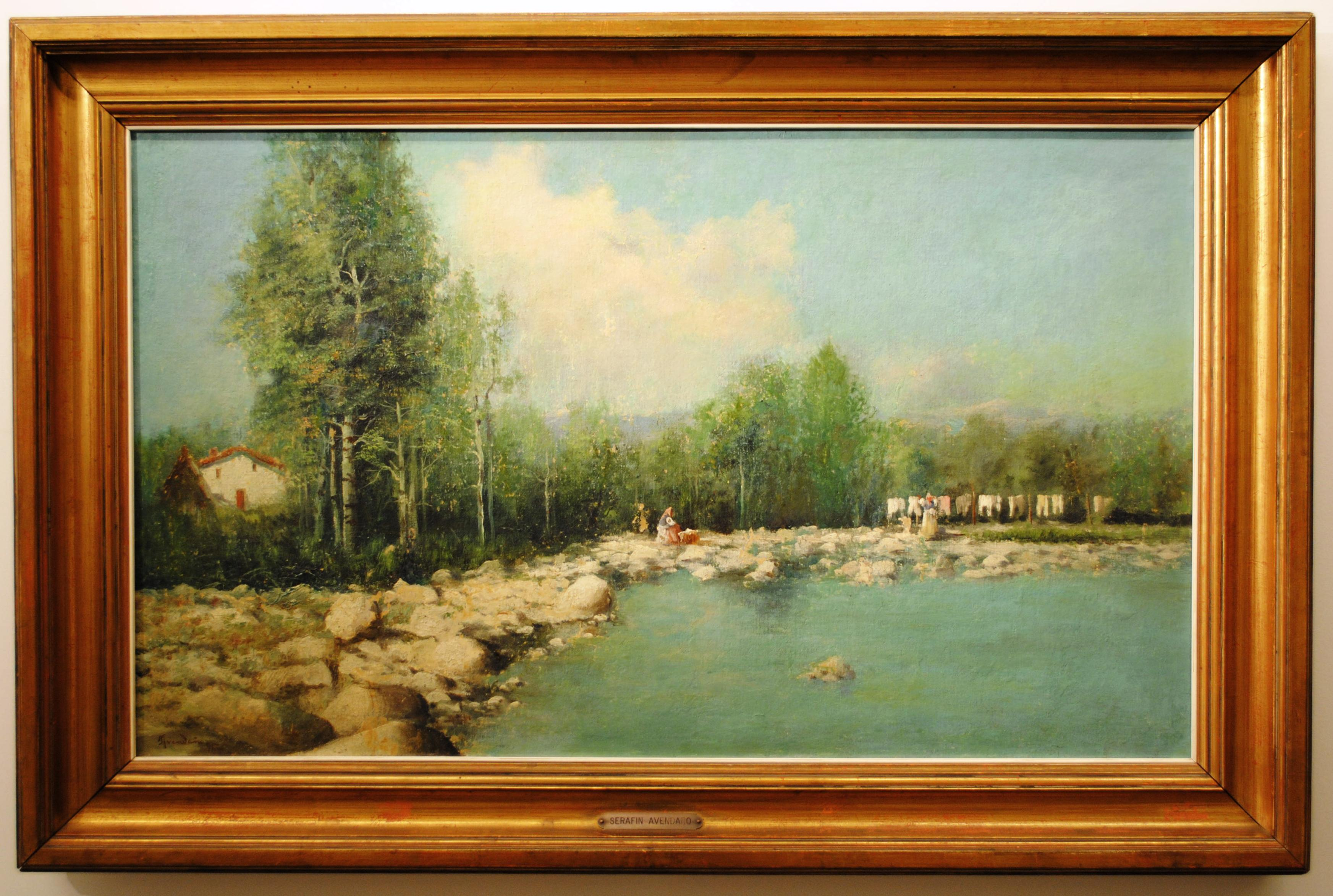 Vexa o título e as categorías.